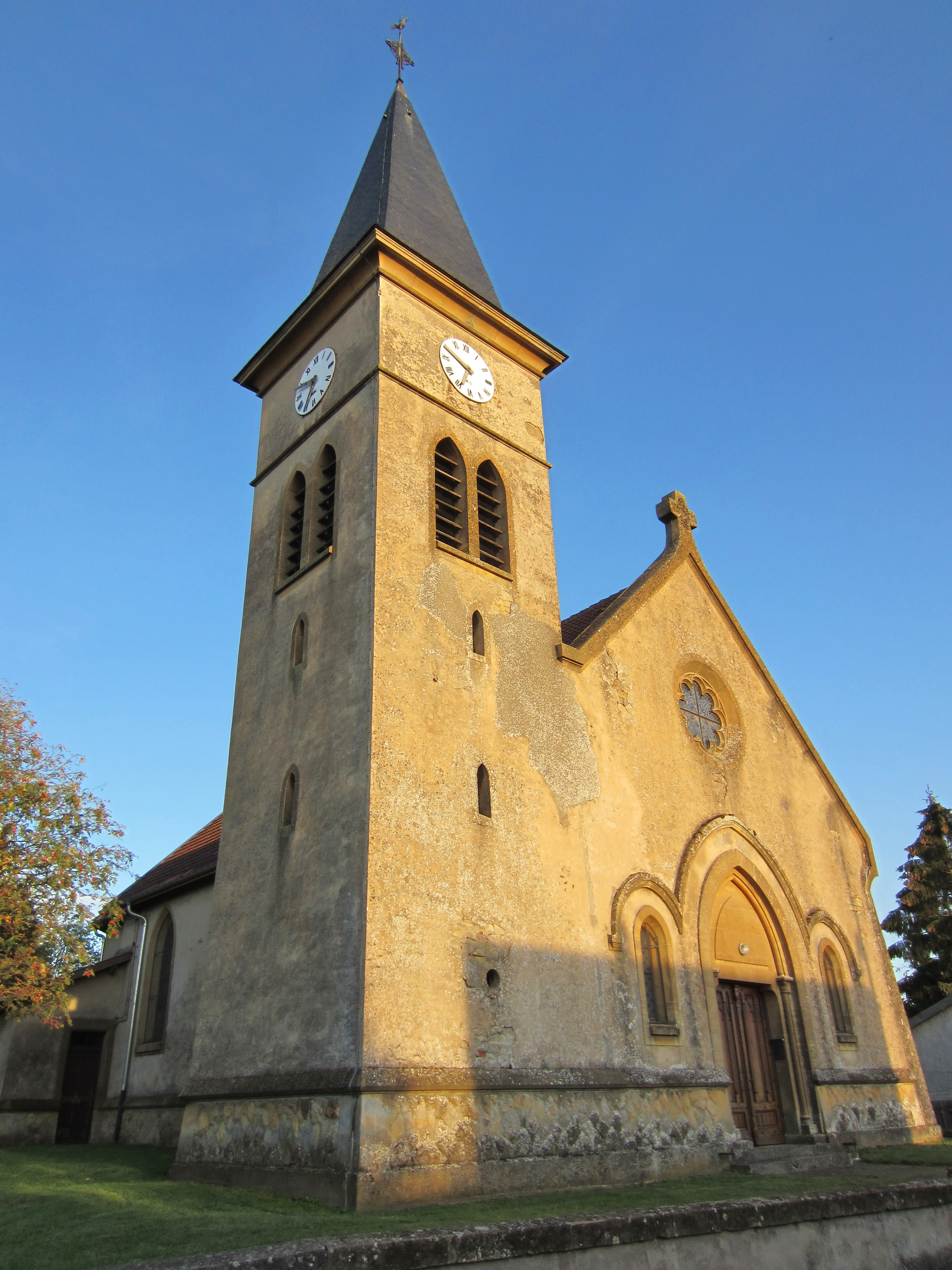 Description eglise de la trinité Aix Gondrecourt eglise de la trinité Aix Gondrecourt